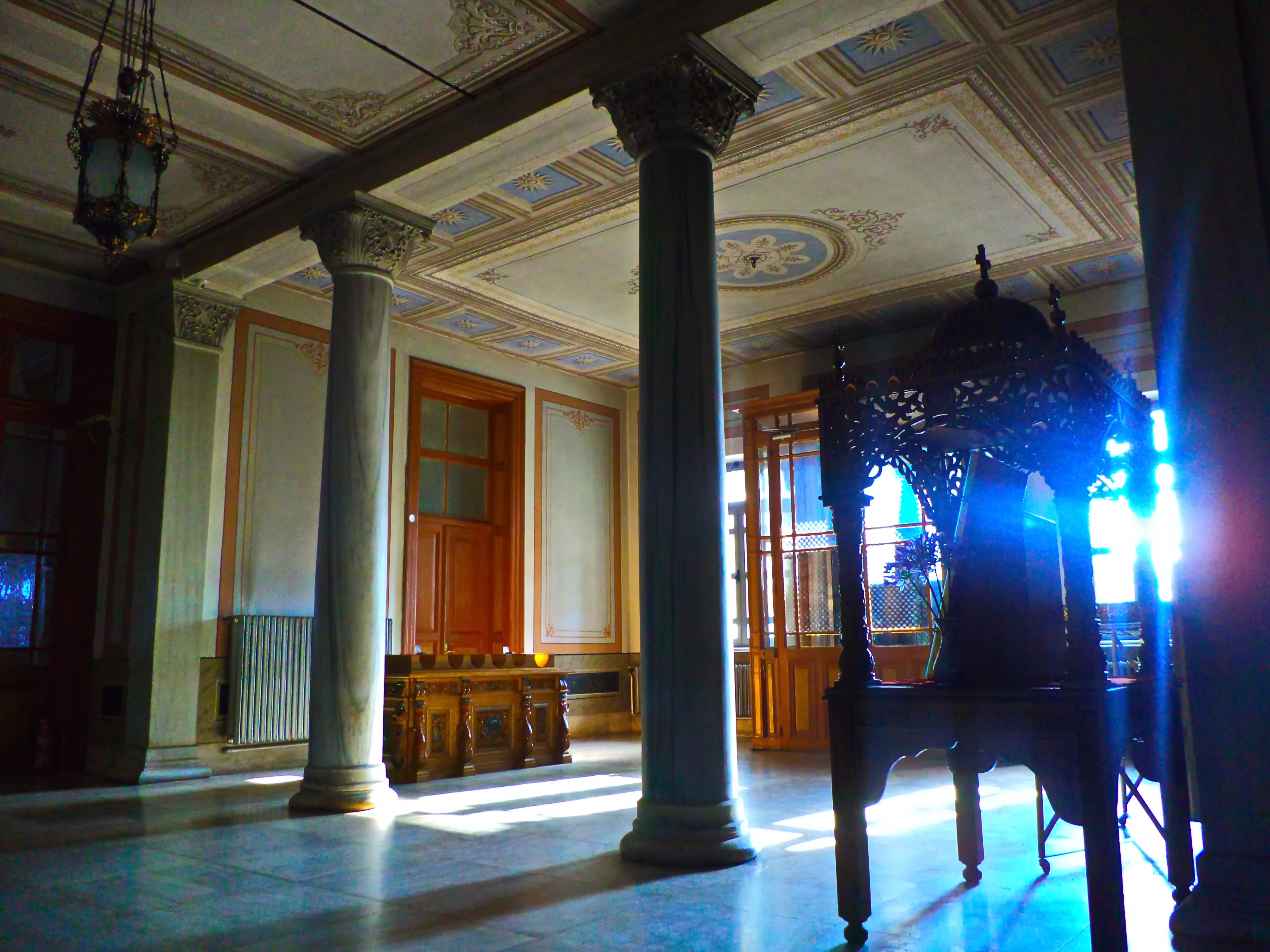 Η Ἱερὰ Θεολογικὴ Σχολὴ τῆς Χάλκης- Το ισόγειο της Θεολογικης Σχολης Χάλκης